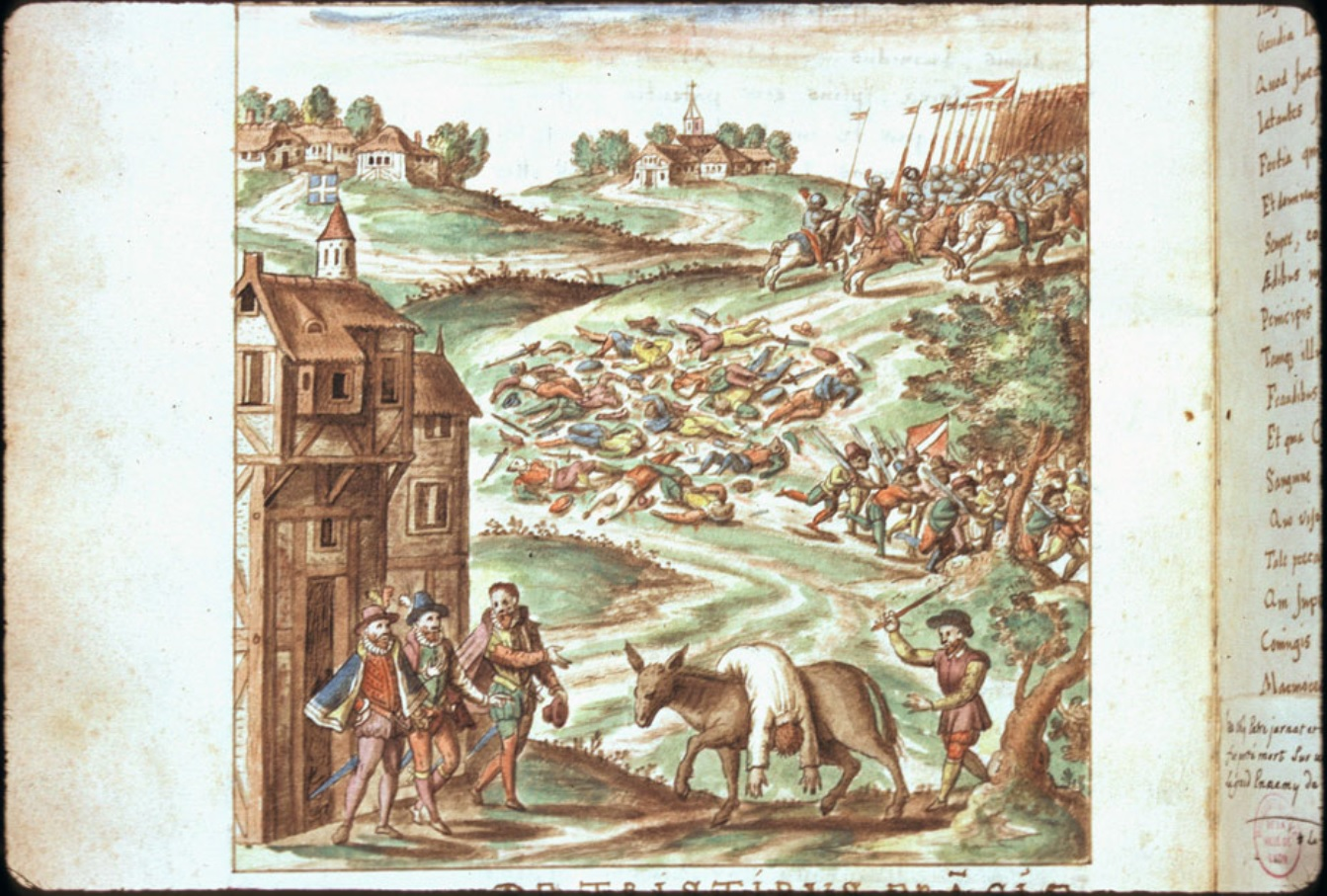 Au premier plan, le cadavre de Condé juché sur un âne. À l'arrière-plan, la défaite des protestants (représentés, en tant qu'hérétiques, comme des « singes du diable ») à l'issue de la bataille de Jarnac. Enluminure du manuscrit Carmen de tristibus Galliae, 1577, Bibliothèque municipale de Lyon, ms. 0156, folio 16 verso.